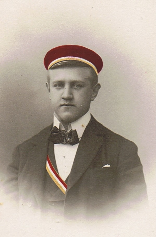 Porträtfotografie von Heinrich Kochendörffer als Mitglied des Corps Starkenburgia Gießen